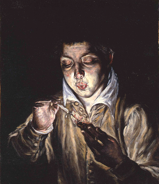 El Soplón